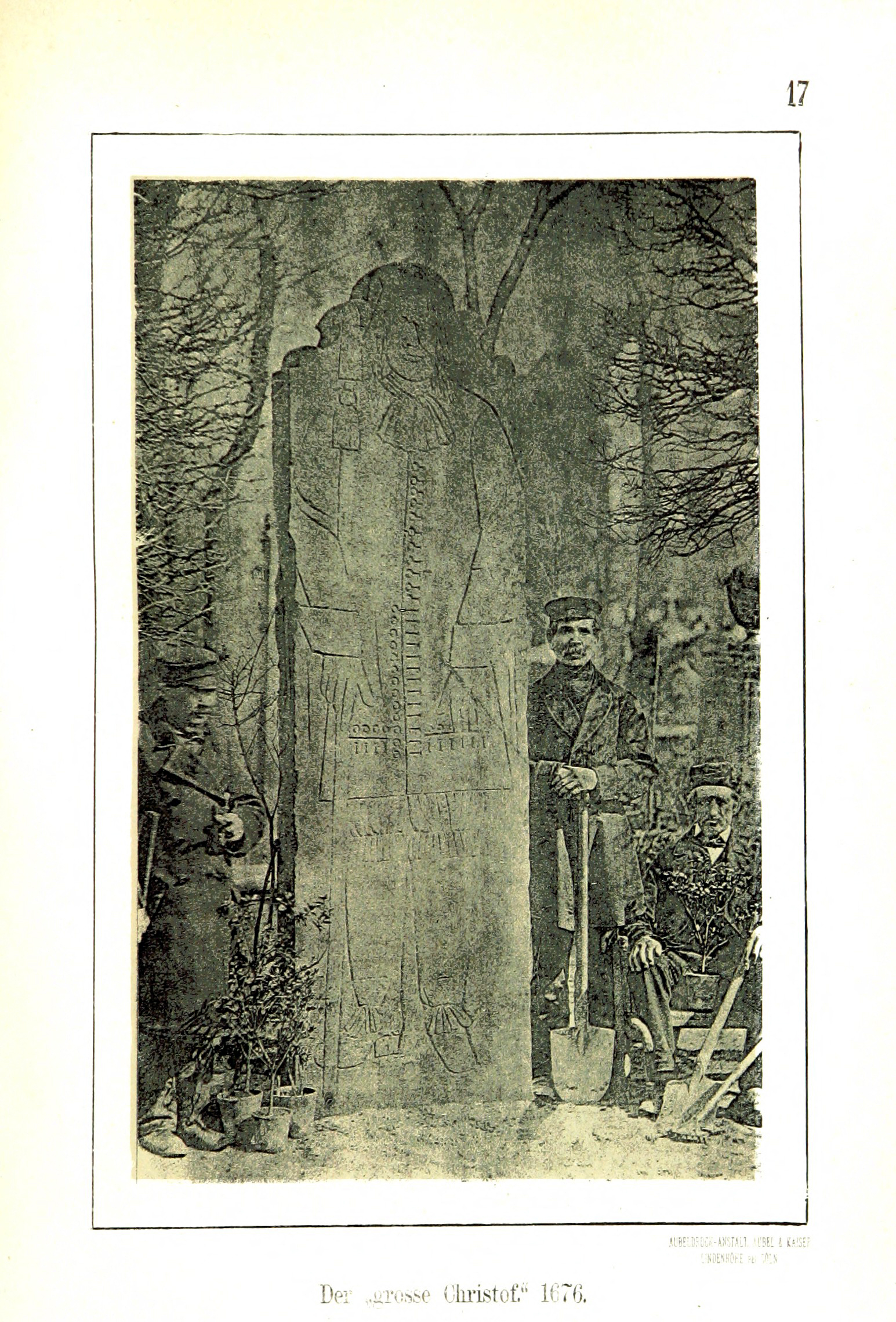 Das Grabmal des Langen Christoffs auf dem Neustädter Friedhof in Hannover mit drei Gärtnern, die hier in einer mit Schaufeln gegrabenen Grube neue Pflanzen setzen wollen. Die Fotolithografischer Druck einer um 1876 getätigten Aufnahme (eines noch unidentifizierten Fotografen) mit der (Seiten?-)Nummer 17 entstammt dem von dem Historiker August Jugler (1833-1888) herausgegebenen Buch Aus Hannovers Vorzeit. Ein Beitrag zur deutschen Cultur-Geschichte ... Mit 23 photolithographischen Abbildungen, etc. und wurde ursprünglich 1876 von der Aubeldruck-Anstalt, Aubel & Kaiser, Lindenhöhe [38 b] bei Cöln gedruckt. Das hier zu sehende Digitalisat wurde im Rahmen einer umfangreicheren Aktion der British Library auf der Plattform Flickr hochgeladen (anstatt direkt hier bei Commons), von dort in höchstmöglicher Größe heruntergeladen, dann mit einem Foto-Bearbeitungsprogramm per "Autokontrast" abgedunkelt und endlich hier hochgeladen. Der Begleittext aus dem Buch fehlt noch - und enthält möglicherweise den Hinweis auf den ursprünglichen Urheber ...